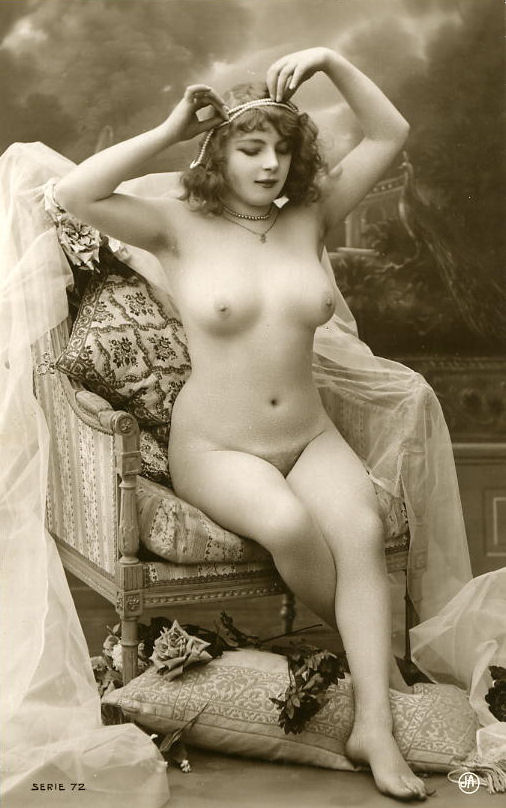 Miss Fernande